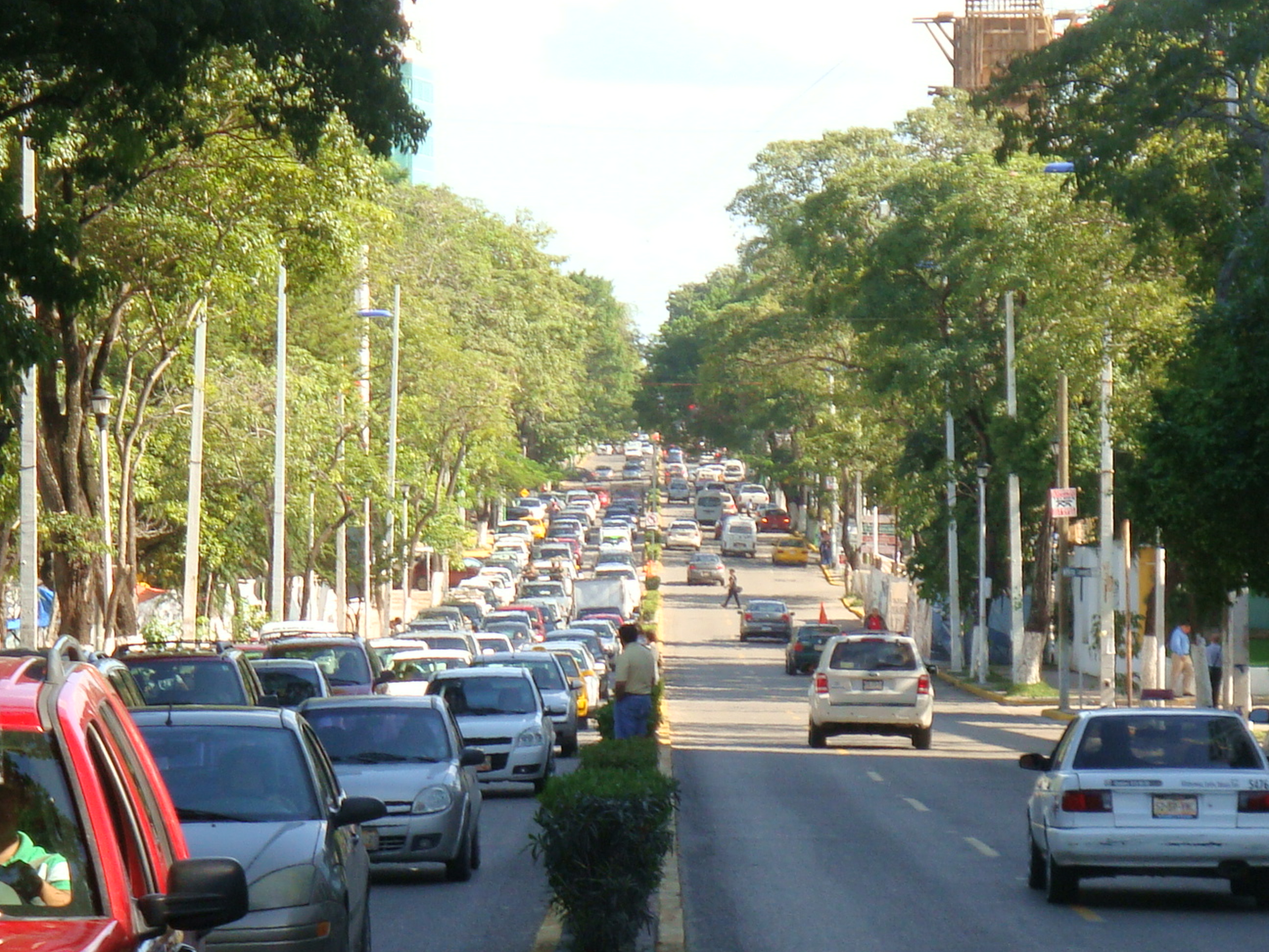 Panorámica de la Av. Paseo Tabasco, la más emblemática de la ciudad de Villahermosa, estado de Tabasco, México.